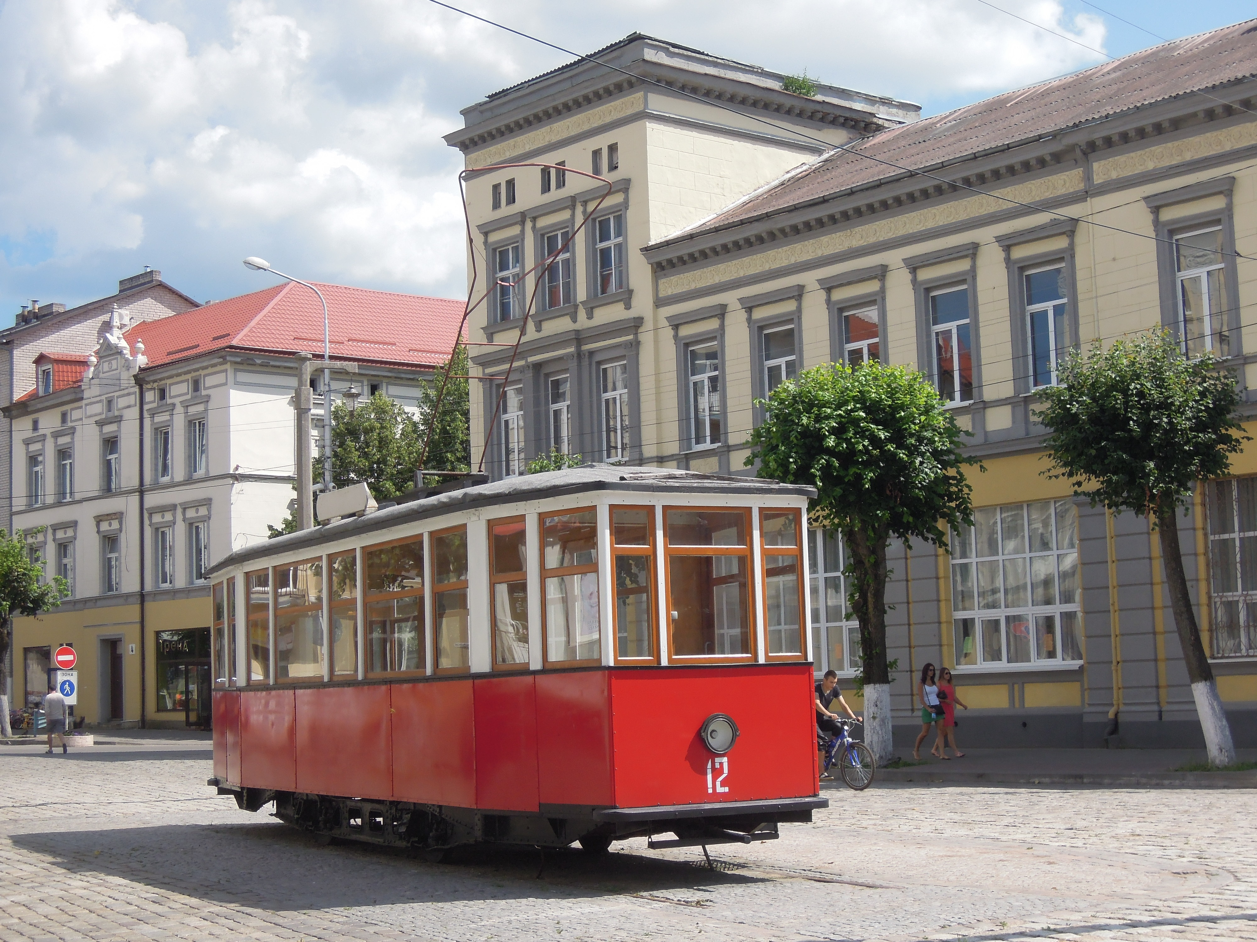 Трамвай-памятник МС-4 № 12 (бывший Петербургский 2601) на улице Победы в Советске